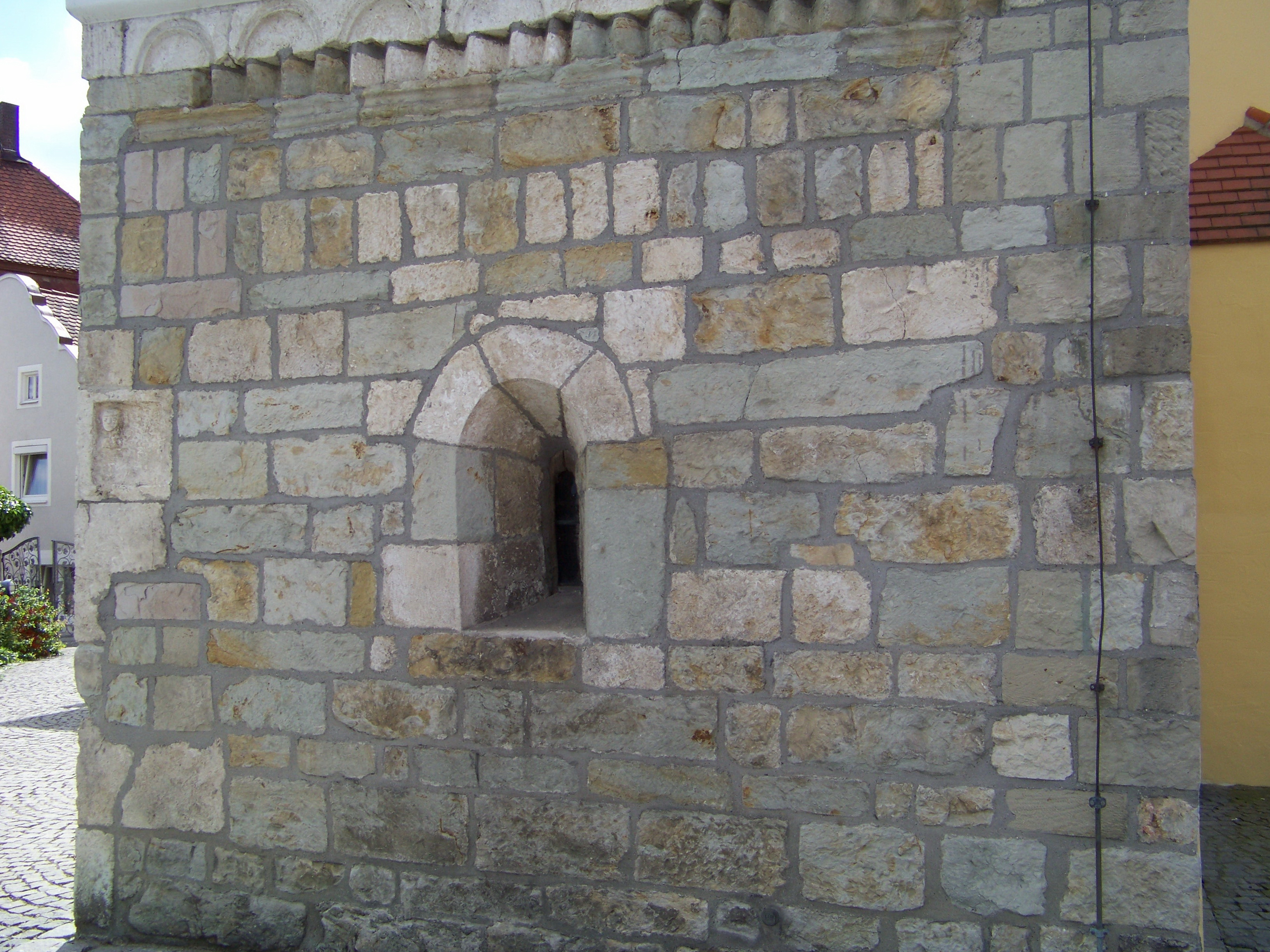 Langquaid Marktplatz 14. Katholische Pfarrkirche St. Jakob d. Ä. Saalkirche mit Steildach, eingezogenem Rechteckchor und Chorscheitelturm, Portalvorhalle nach Süden, Chor und Turm im Kern romanisch, 13. Jahrhundert, Langhaus spätgotisch, 15. Jahrhundert, Barockisierung der Anlage um 1740, Verlängerungen nach Westen, 1917 und 2004. Turmunterbau mit Bruchsteinen und kleinem Schlitzfensterchen.